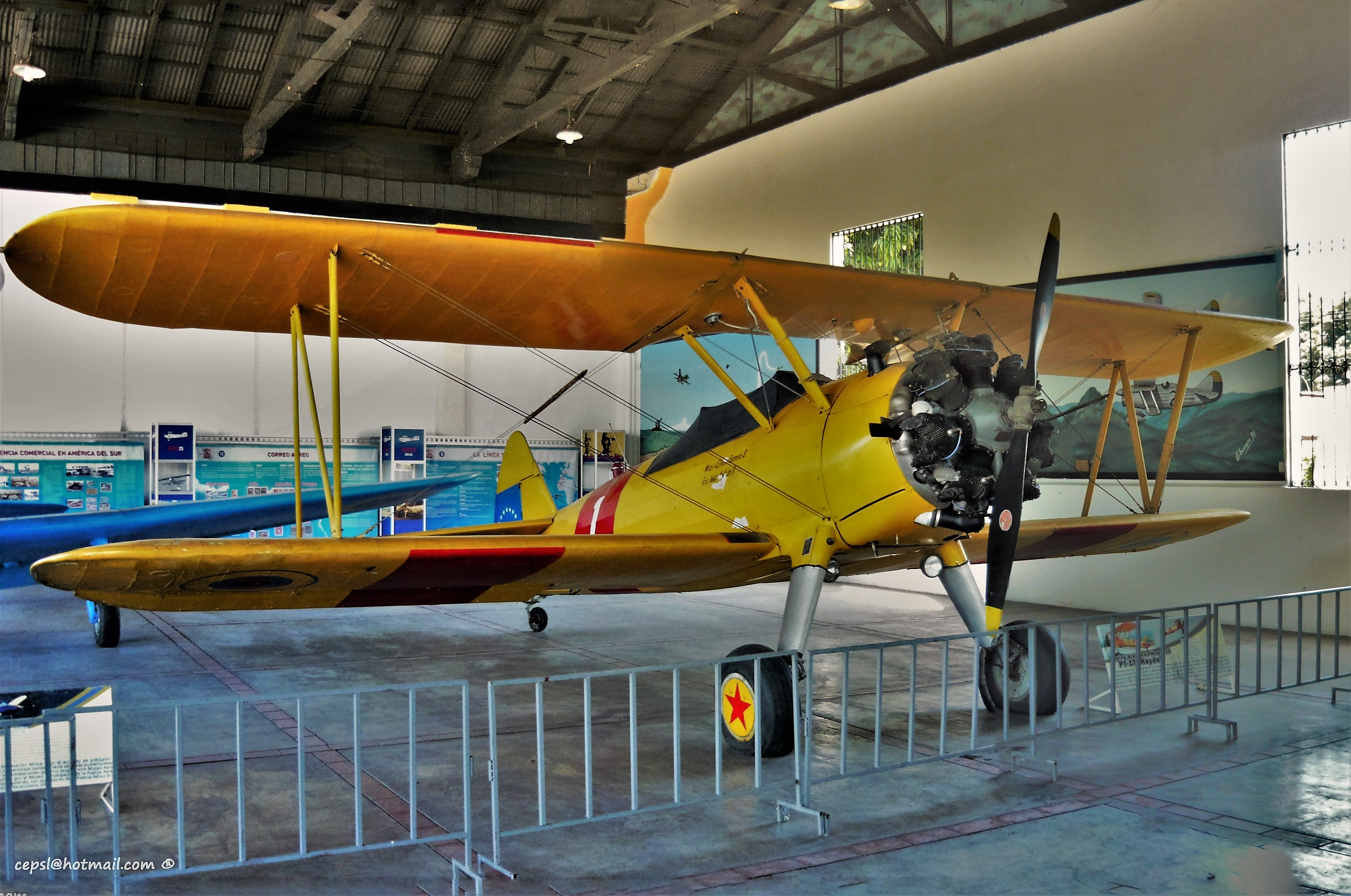 Boeing Stearman PT-17 Kaydet (1)